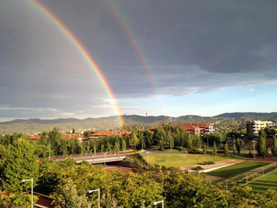 Vistes panoràmiques des del turó